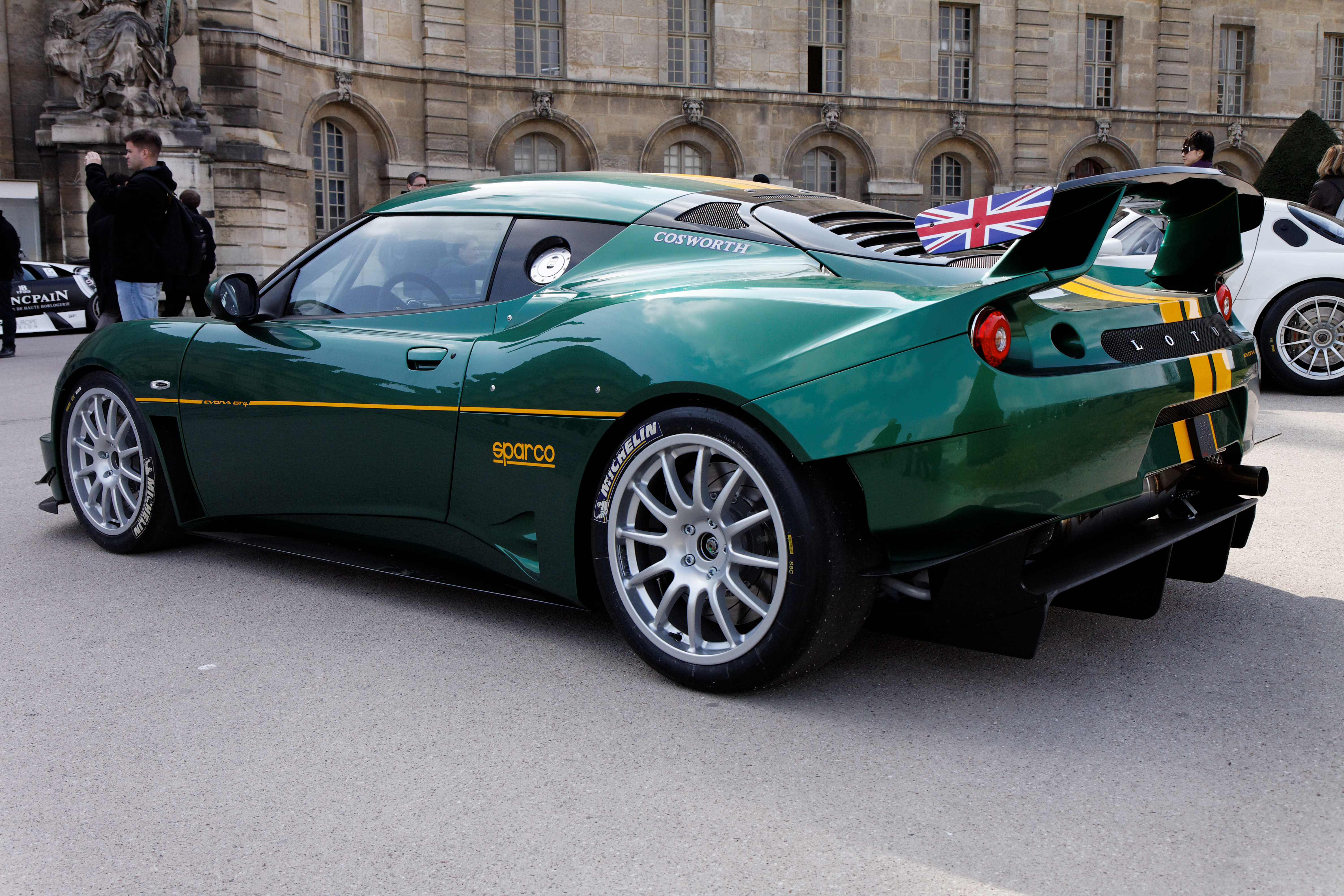 Photographie prise lors de la présentation du Blancpain Endurance series aux Invalides à Paris en mars 2011.